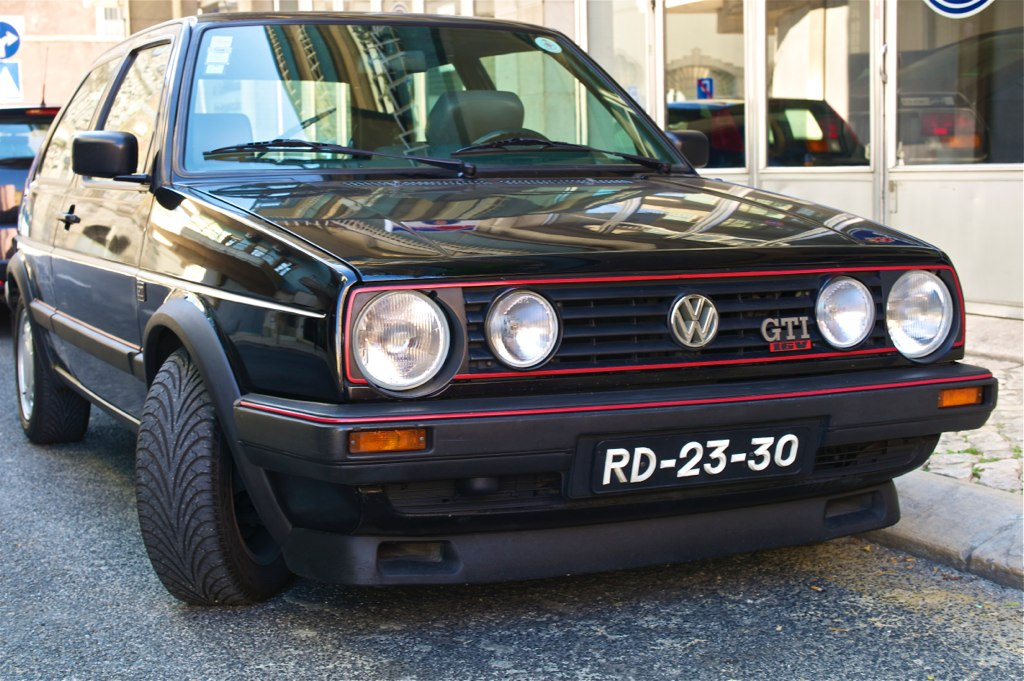 Lisbon, Portugal